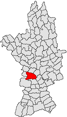 Categorie:Hărţi ale judeţului Olt